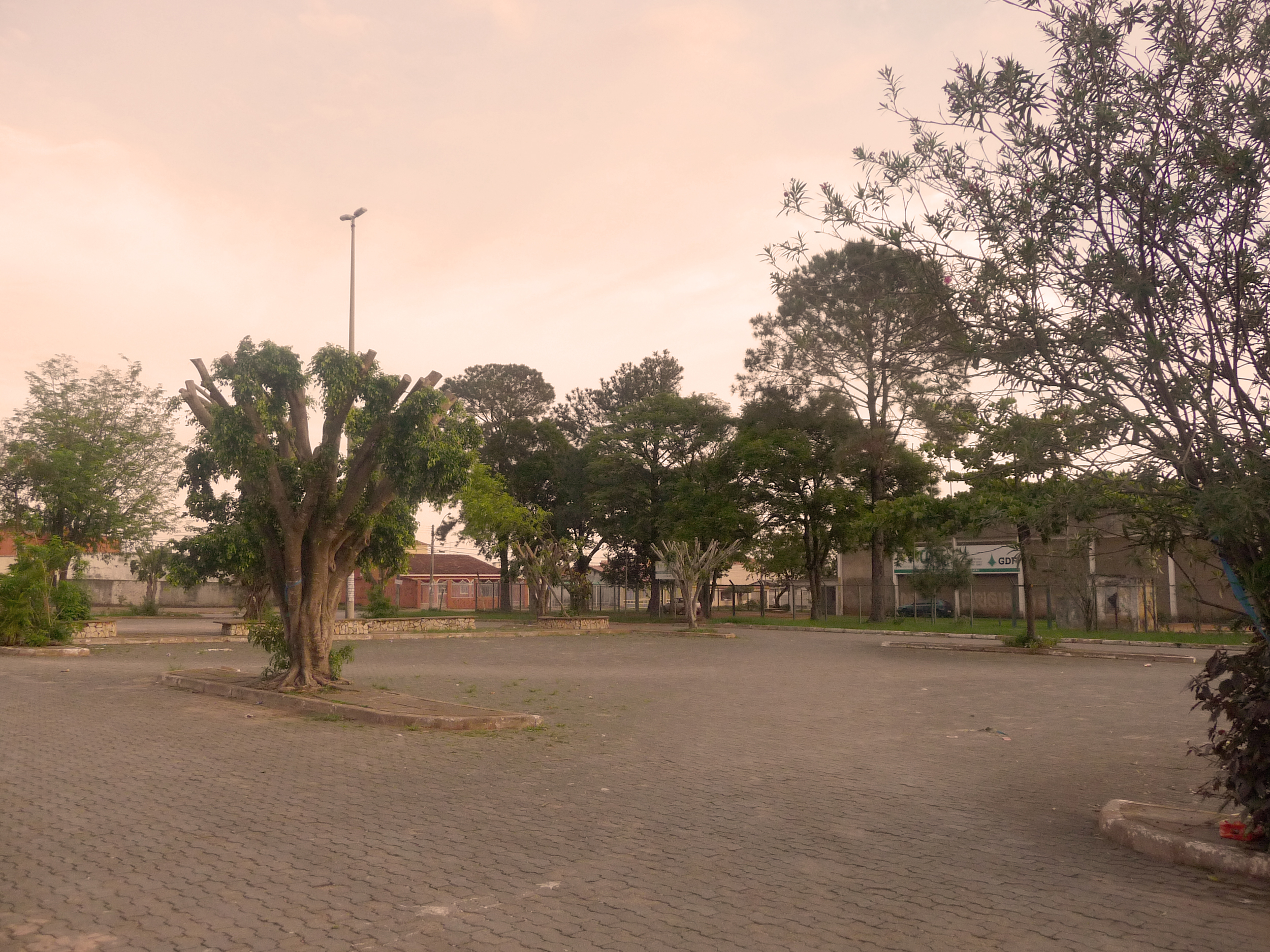 Praça QNM 36/38 Setor M Norte Taguatinga